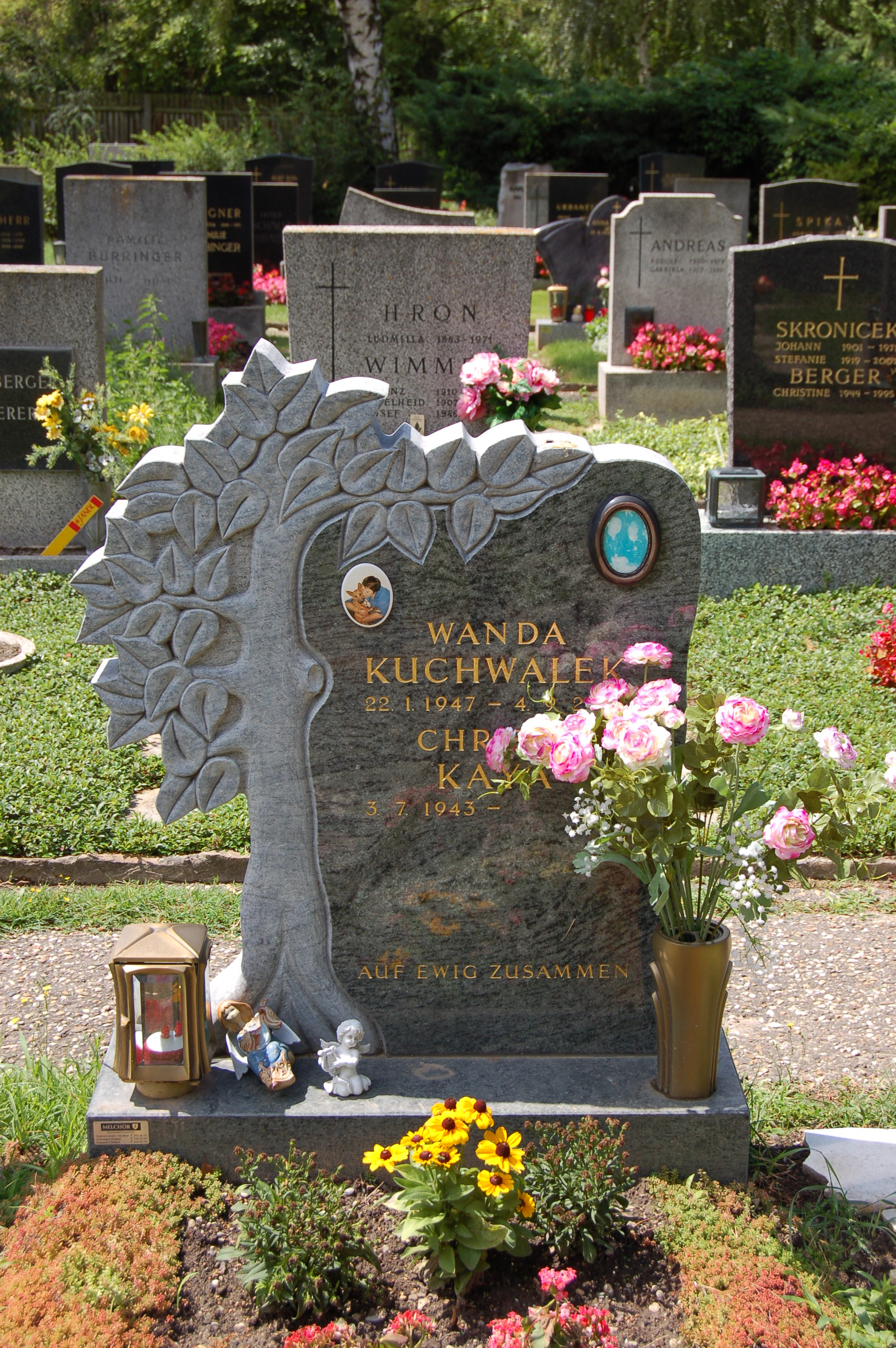 Stammersdorfer Zentralfriedhof, Grabmal von Wanda Kuchwalek